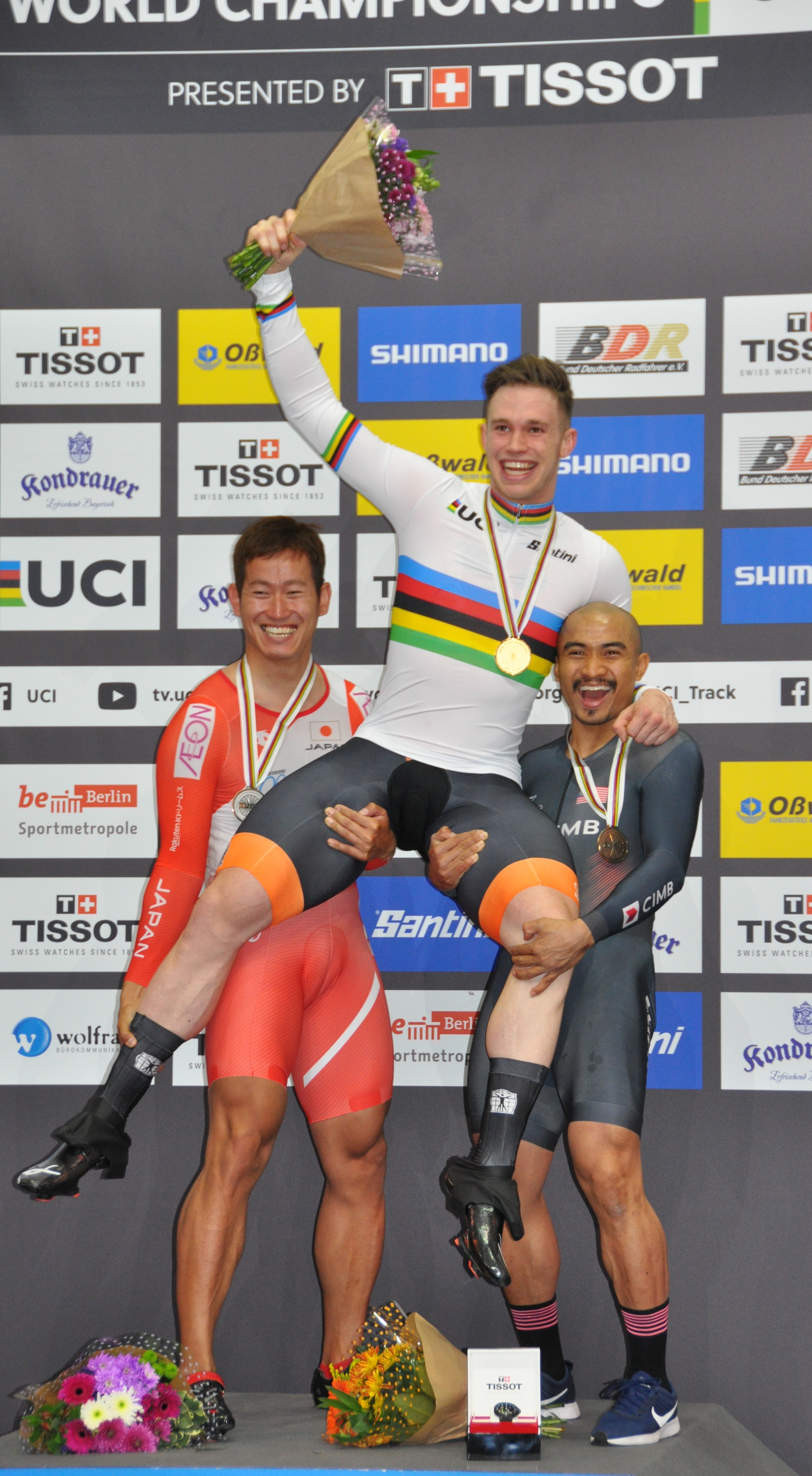 Podium Keirin (v.l.n.r.): Yūta Wakimoto, Harrie Lavreysen, Azizulhasni Awang